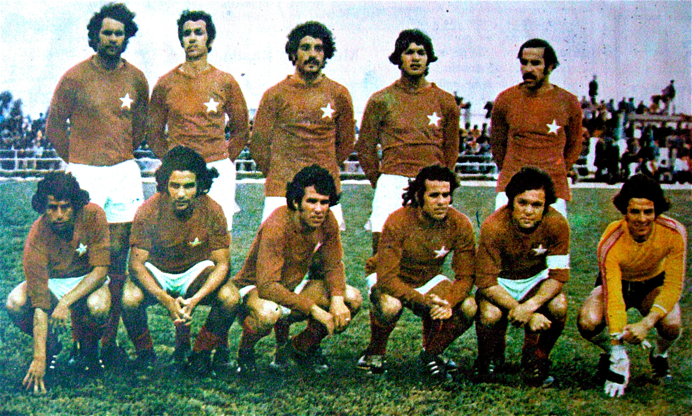 Équipe de l'Étoile sportive du Sahel vainqueur de la coupe de Tunisie de football en 1974